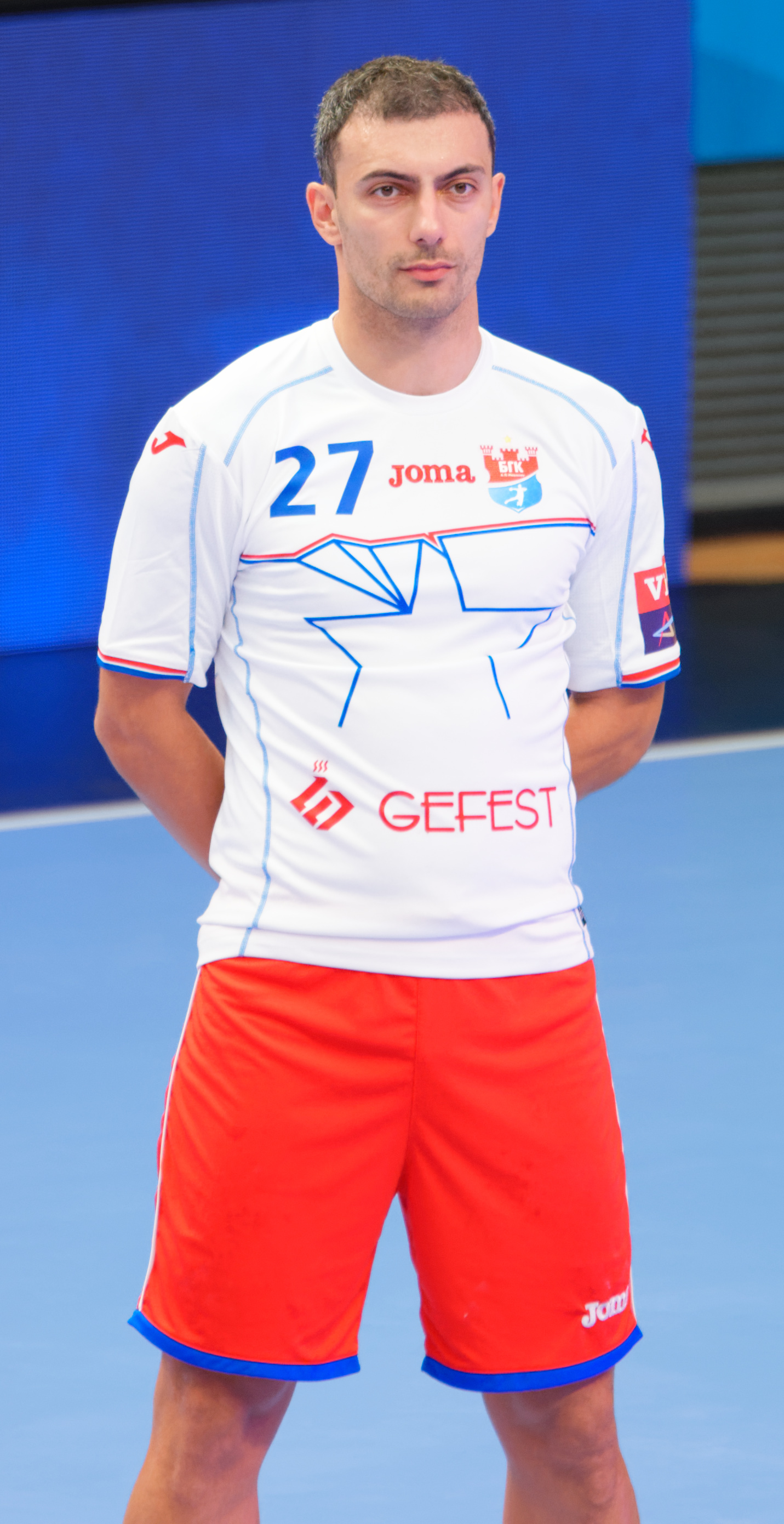 Rencontre de phase de groupe de la ligue des champions 2017/18 entre le PSG et Meshkov Brest A Coubertin le 24 septembre 2017.